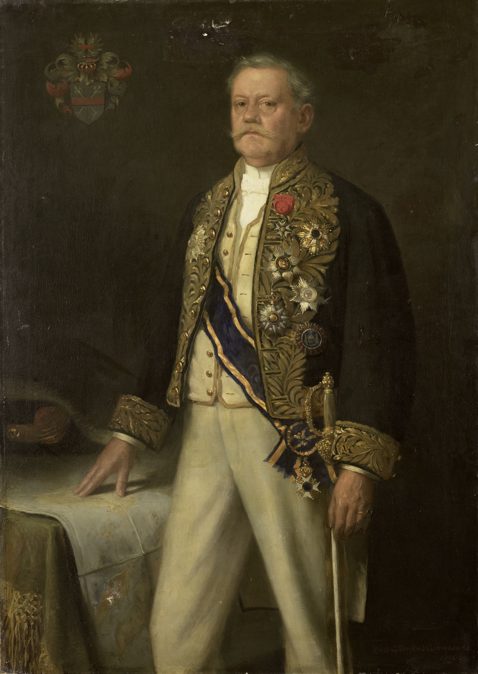 Portret van Carel Herman Aart van der Wijck (1840-1914). Gouverneur-generaal (1893-99). Kniestuk, staande met de rechterhand rustend op een opengevouwen landkaart van Indië op een tafel. Linksboven het familiewapen. Onderdeel van een reeks van portretten van de gouverneurs-generaal van het voormalige Nederlands Oost-Indië. Collection: schilderijen; Gouverneurs-generaal serie